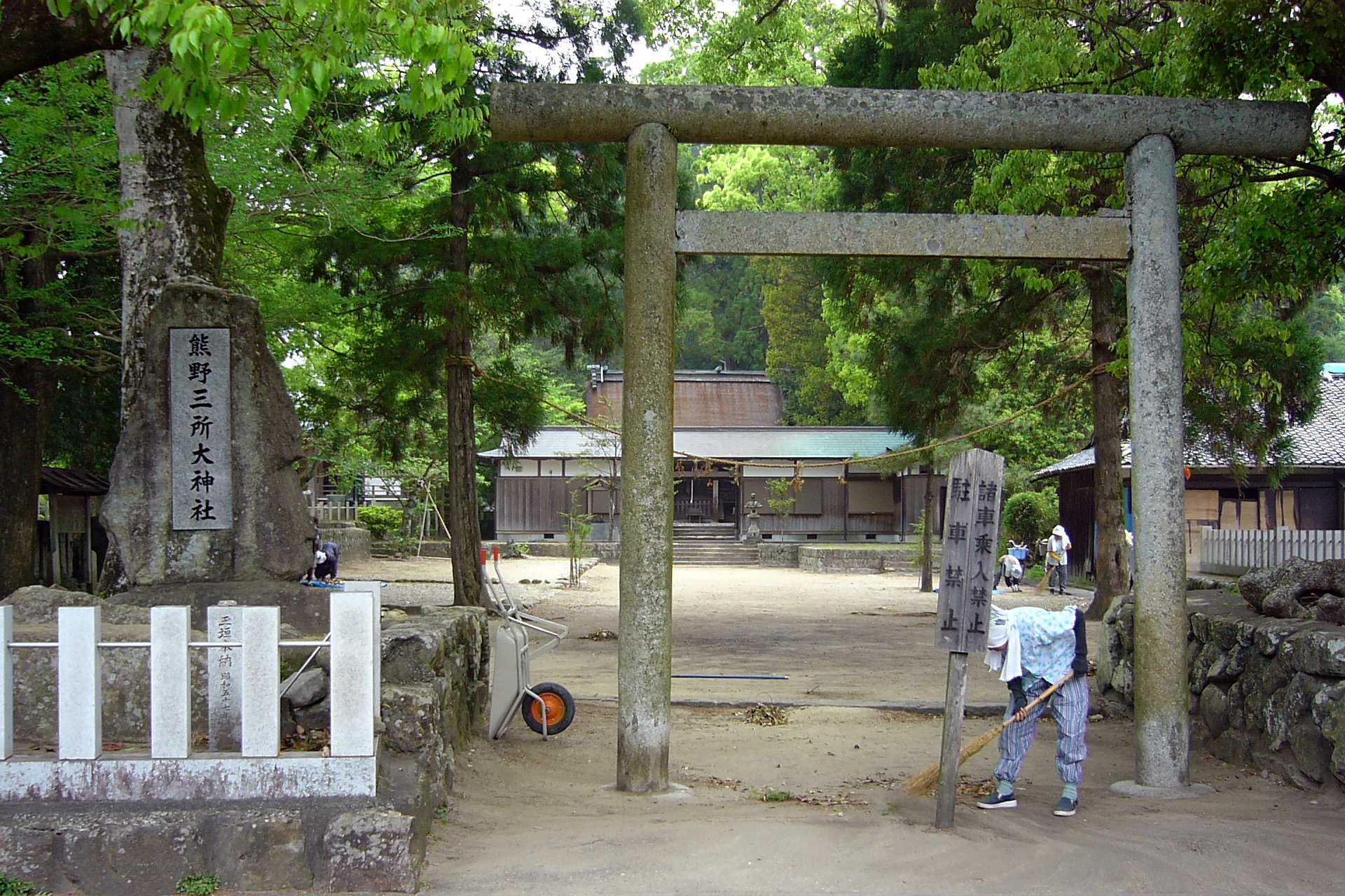 Kumanosanshooomiwasha in Nachikatsuura, Wakayama prefecture